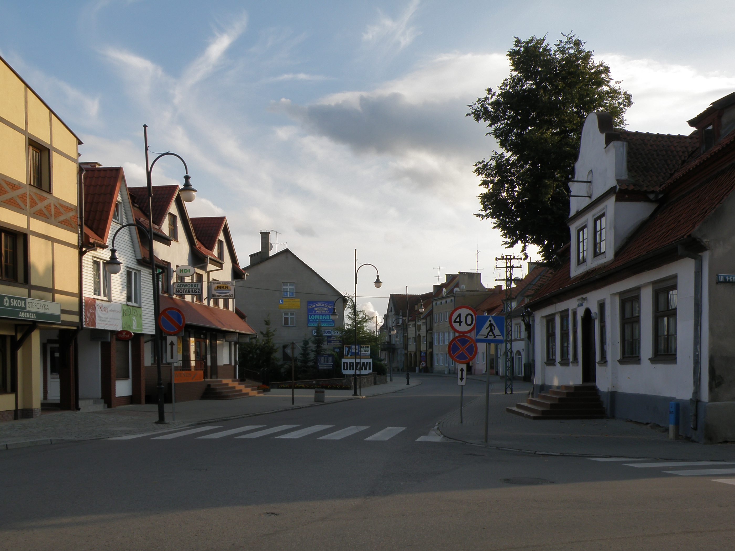 Polska, Pisz, ulica Rybacka This photo of Warmian-Masurian Voivodeship was taken during Wikiexpedition 2012 set up by Wikimedia Polska Association.You can see all photographs in category Wikiekspedycja 2012. The making of this document was supported by Wikimedia Polska.